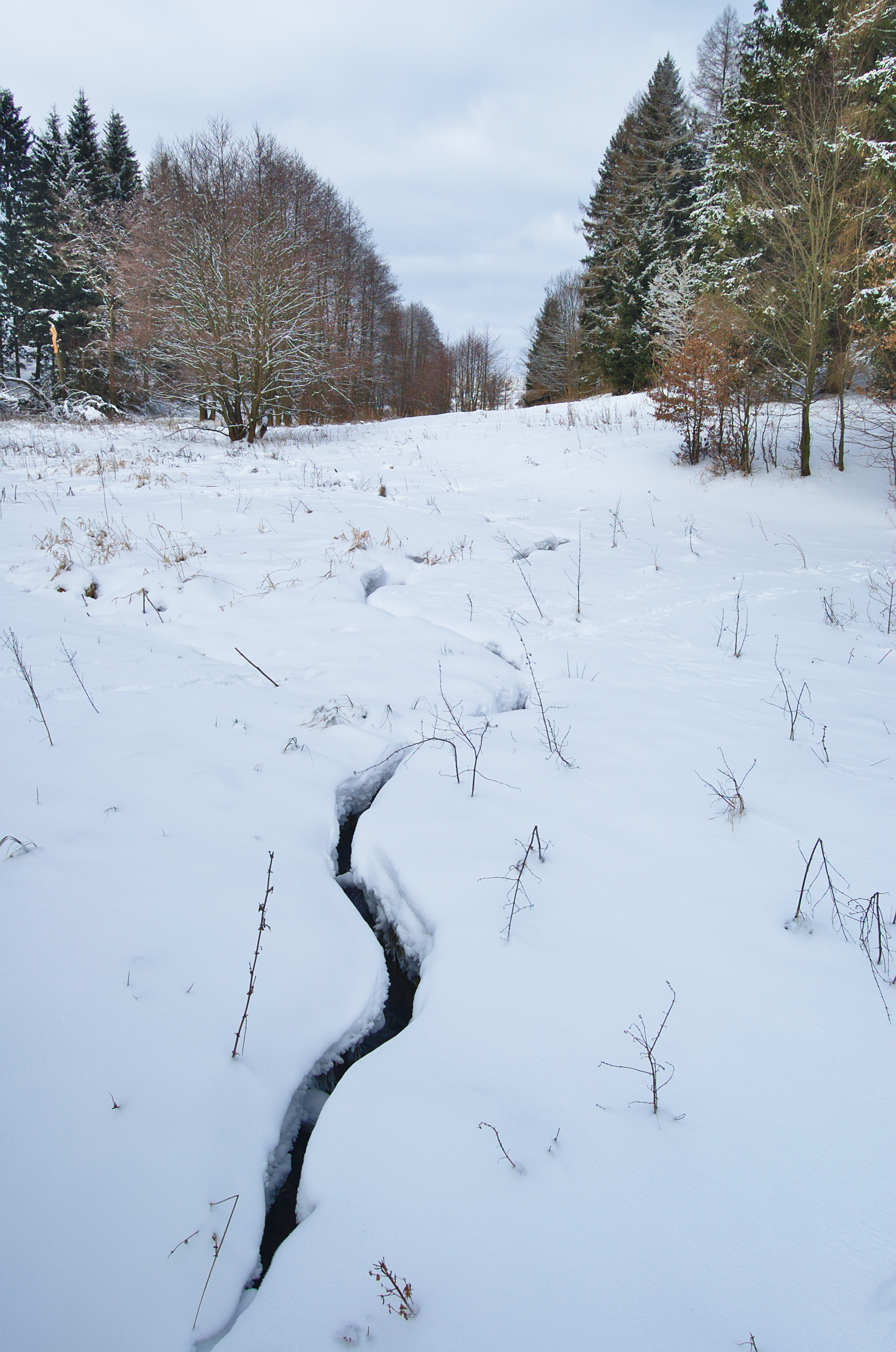 Bezejmenný přítok Hloučely, Lipová, okres Prostějov